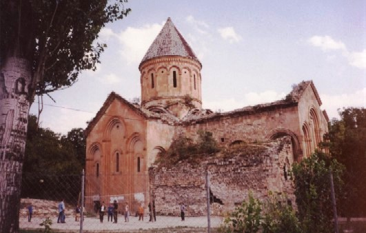 იშხნის მონასტერი